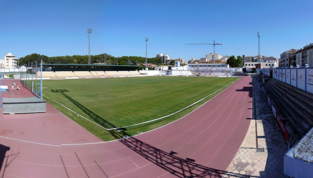 Campo de fútbol de Hellín